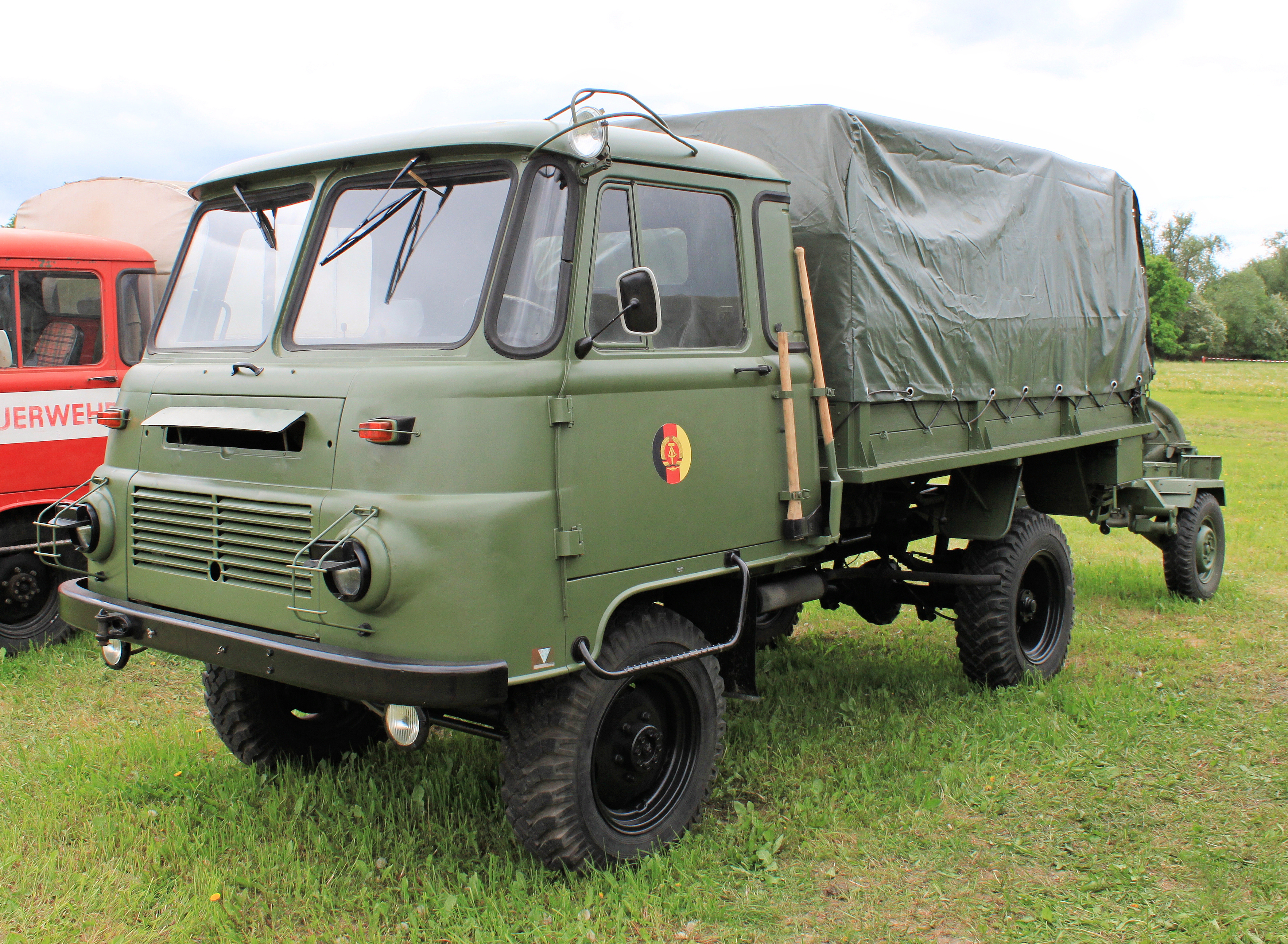 allradgetriebener Robur LO 2002 A aus dem Bestand der ehemaligen NVA mit einem 120-mm-Granatwerfer M1943